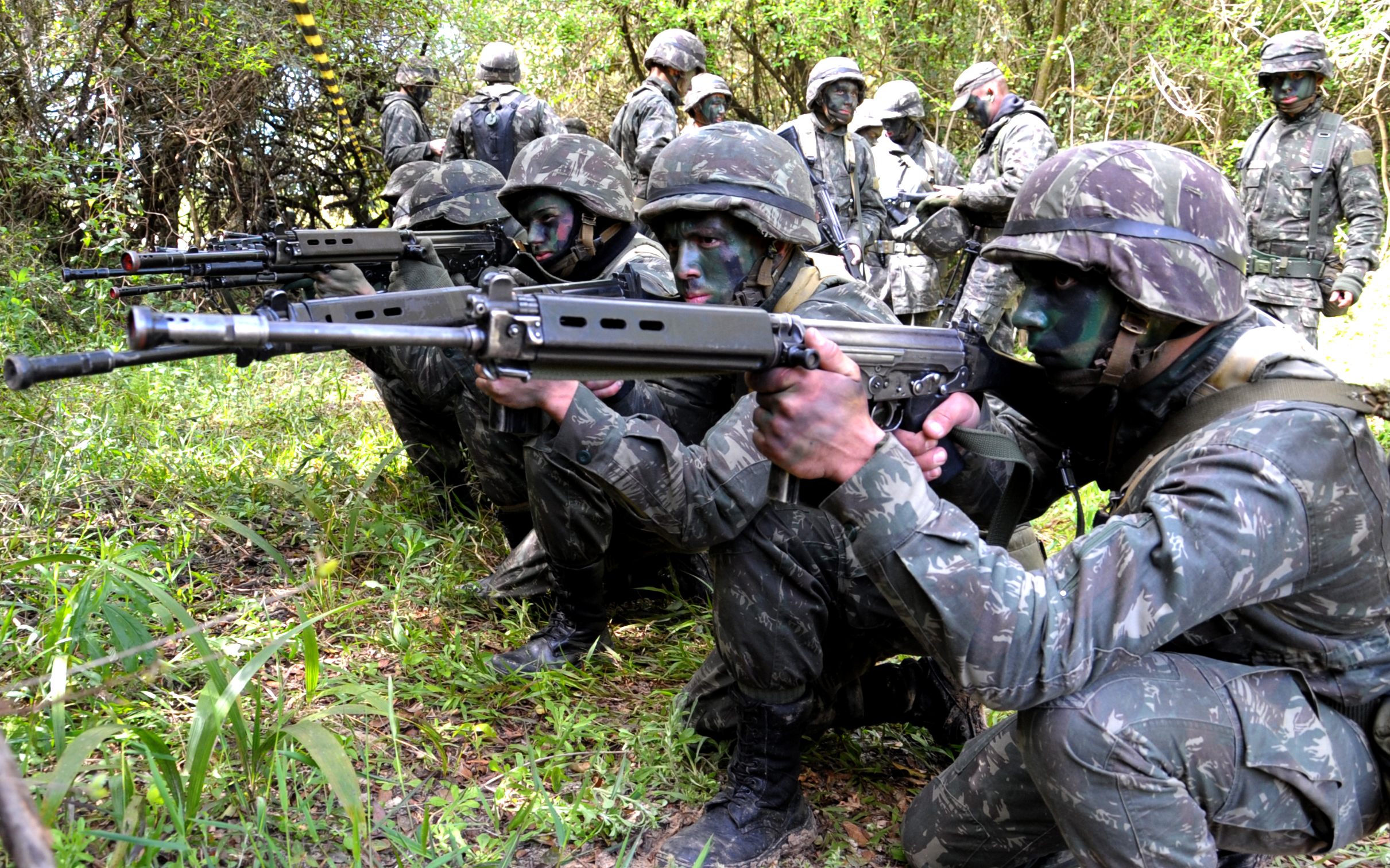 Fotos: Jorge Cardoso